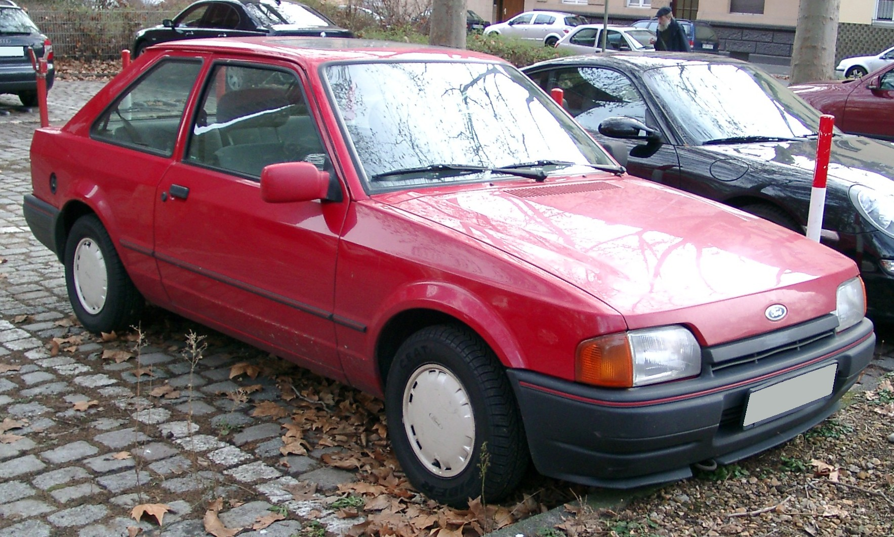 Ford Escort MK4